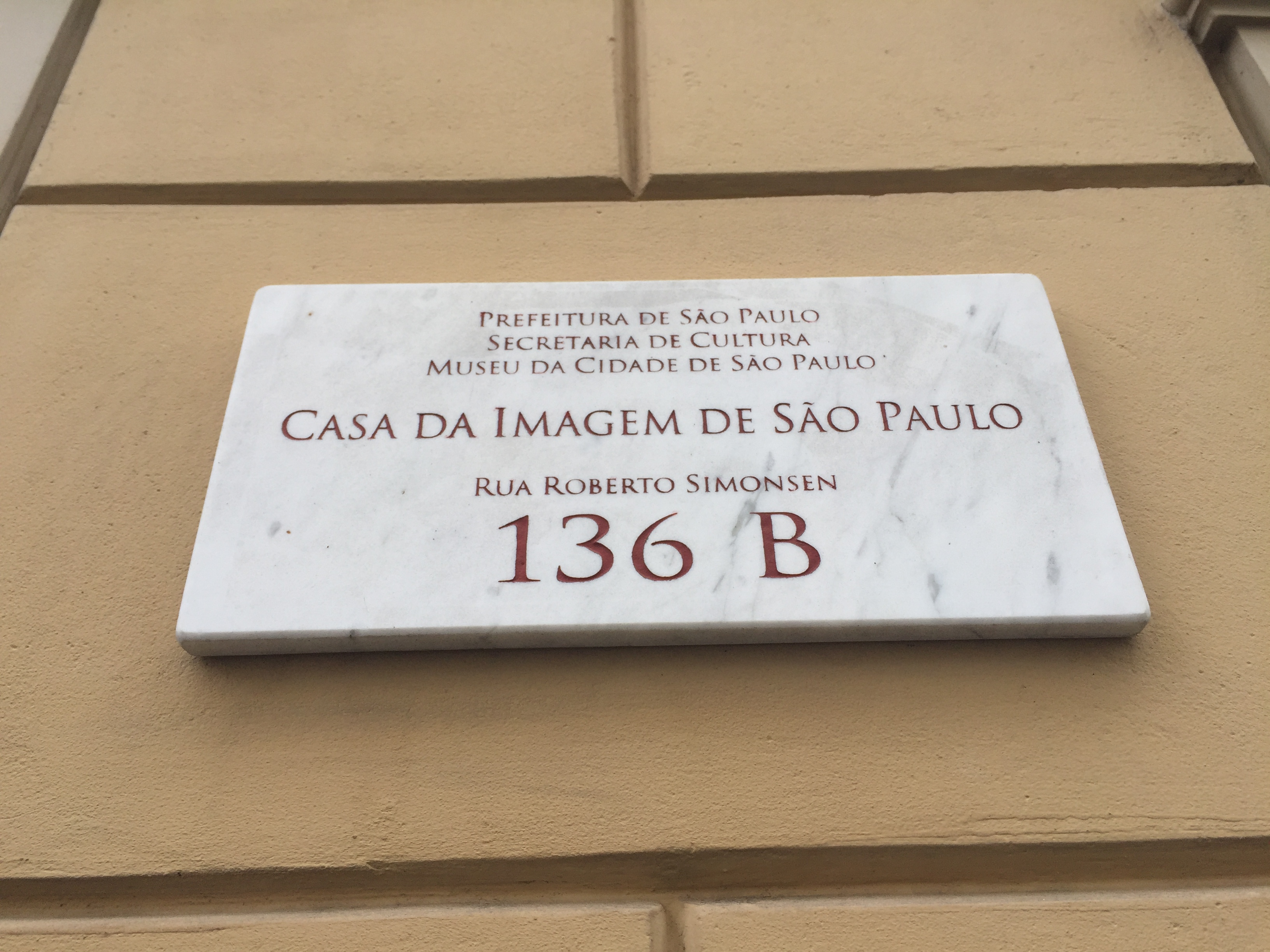 Placa com o endereço e atual nome da Casa Número 1, localizada na fachada do prédio.